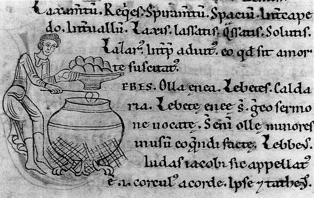 Kochszene mit Kessel - Intitiale L zur Erläuterung von lebes = Kessel, BLB Karlsrtuhe, U.H. Fragm. 1